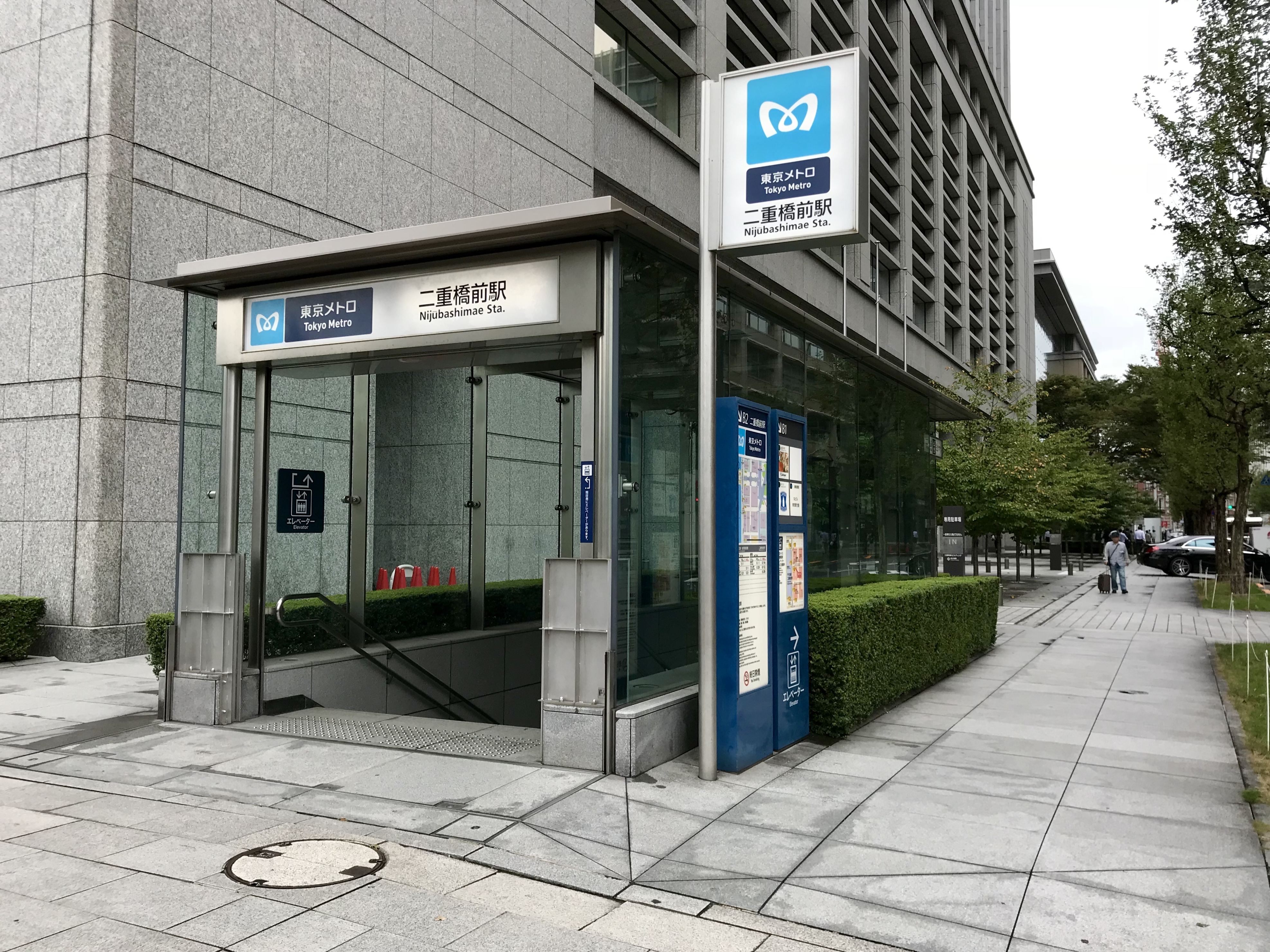 東京メトロ千代田線二重橋前駅5番出入口